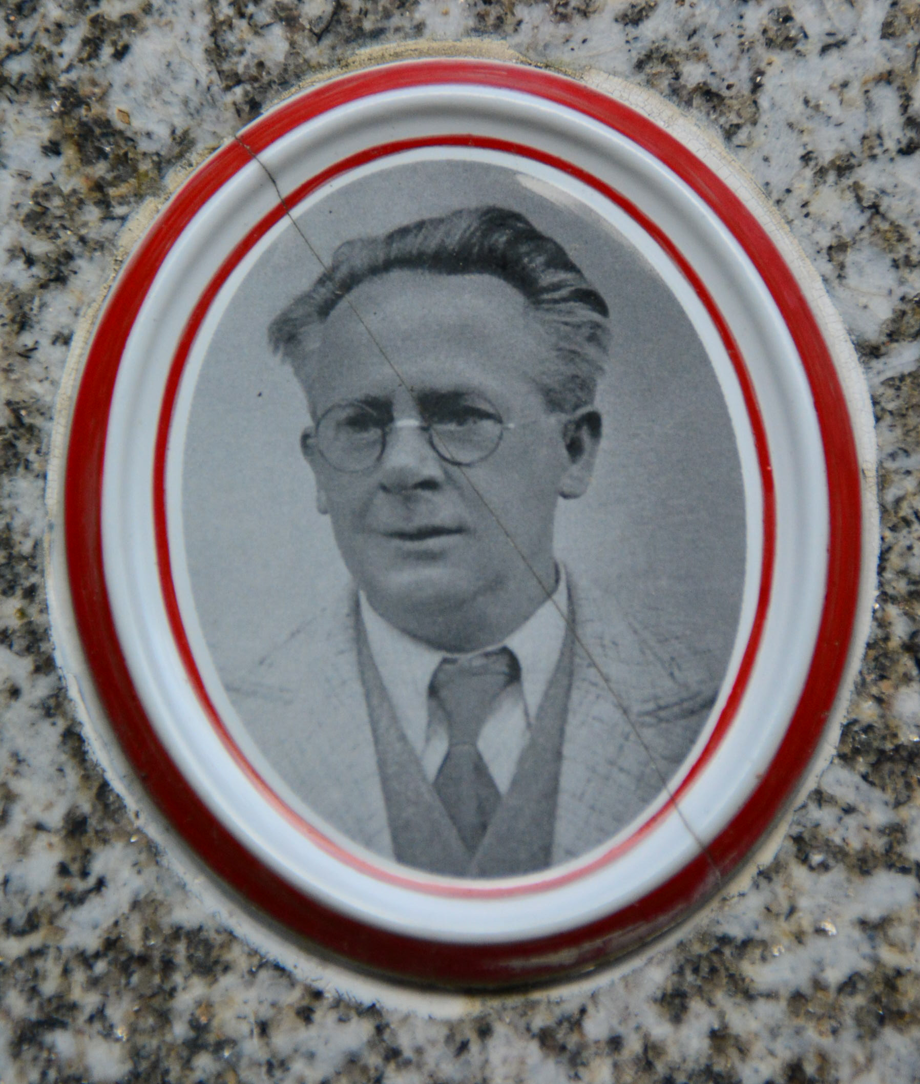 Gedenkstätte für NS-Opfer (Mödring, Isidor_Wozniczak (1892-1945))